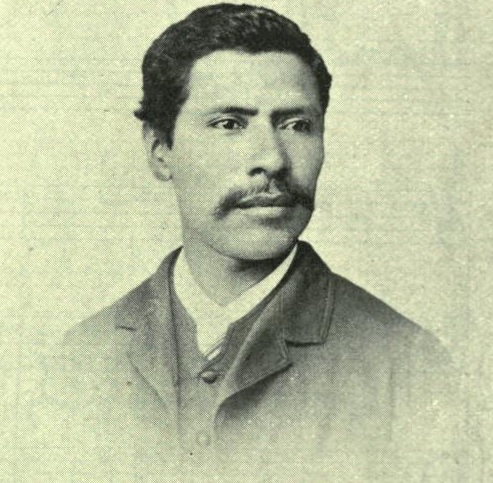 Compositor Rafael Alvarez Ovalle en 1897.